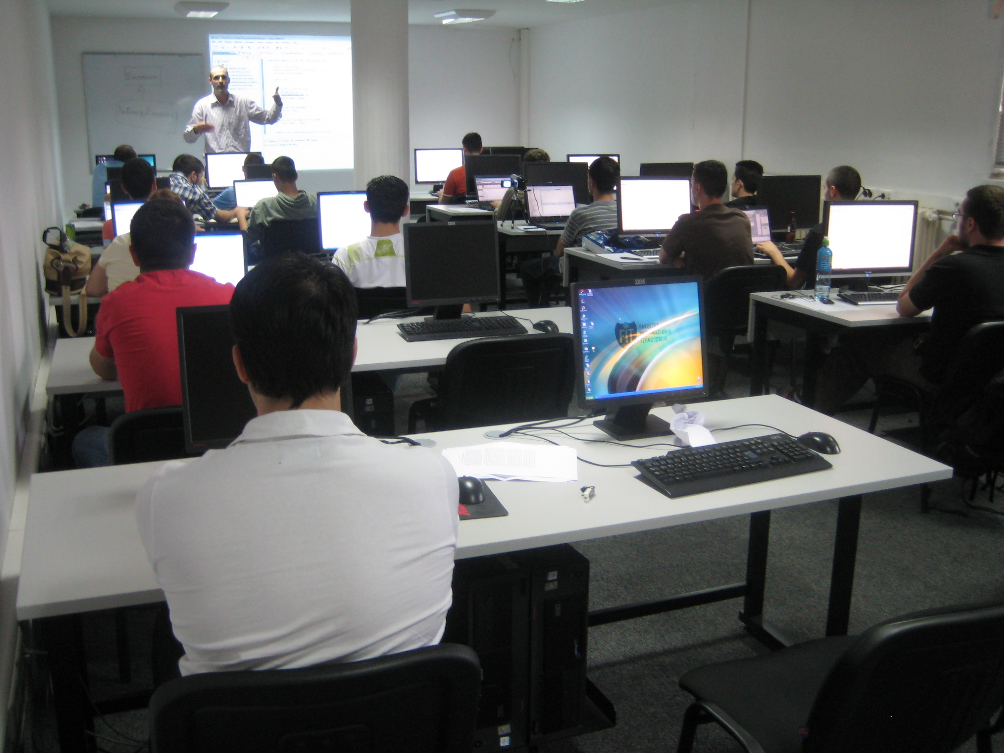 Сцена из учионице током предавања